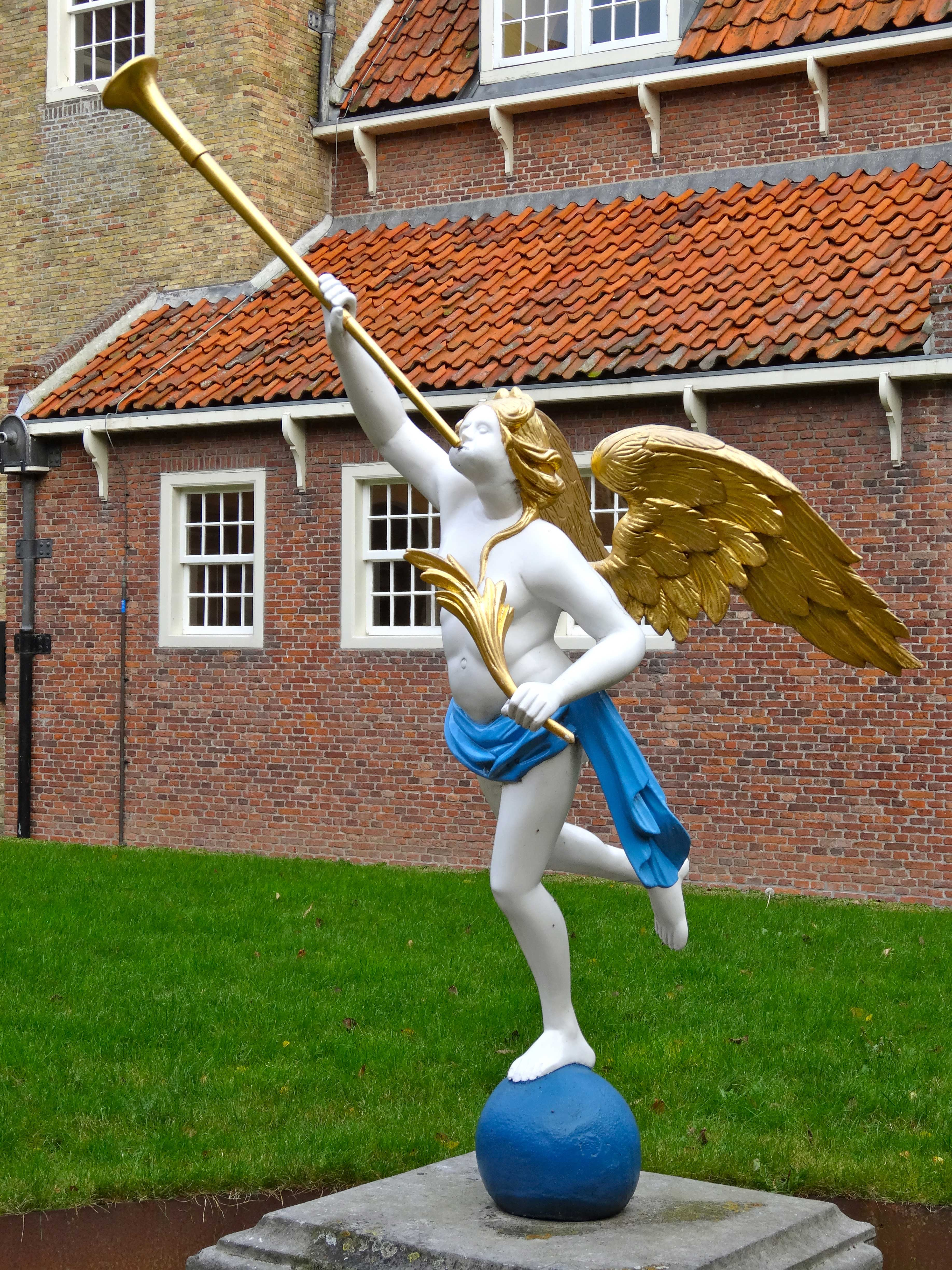 Faam op de binnenplaats Zuiderzeemuseum (Binnenmuseum) te Enkhuizen. Kopie van een dergelijke faam uit de Zaanstreek.